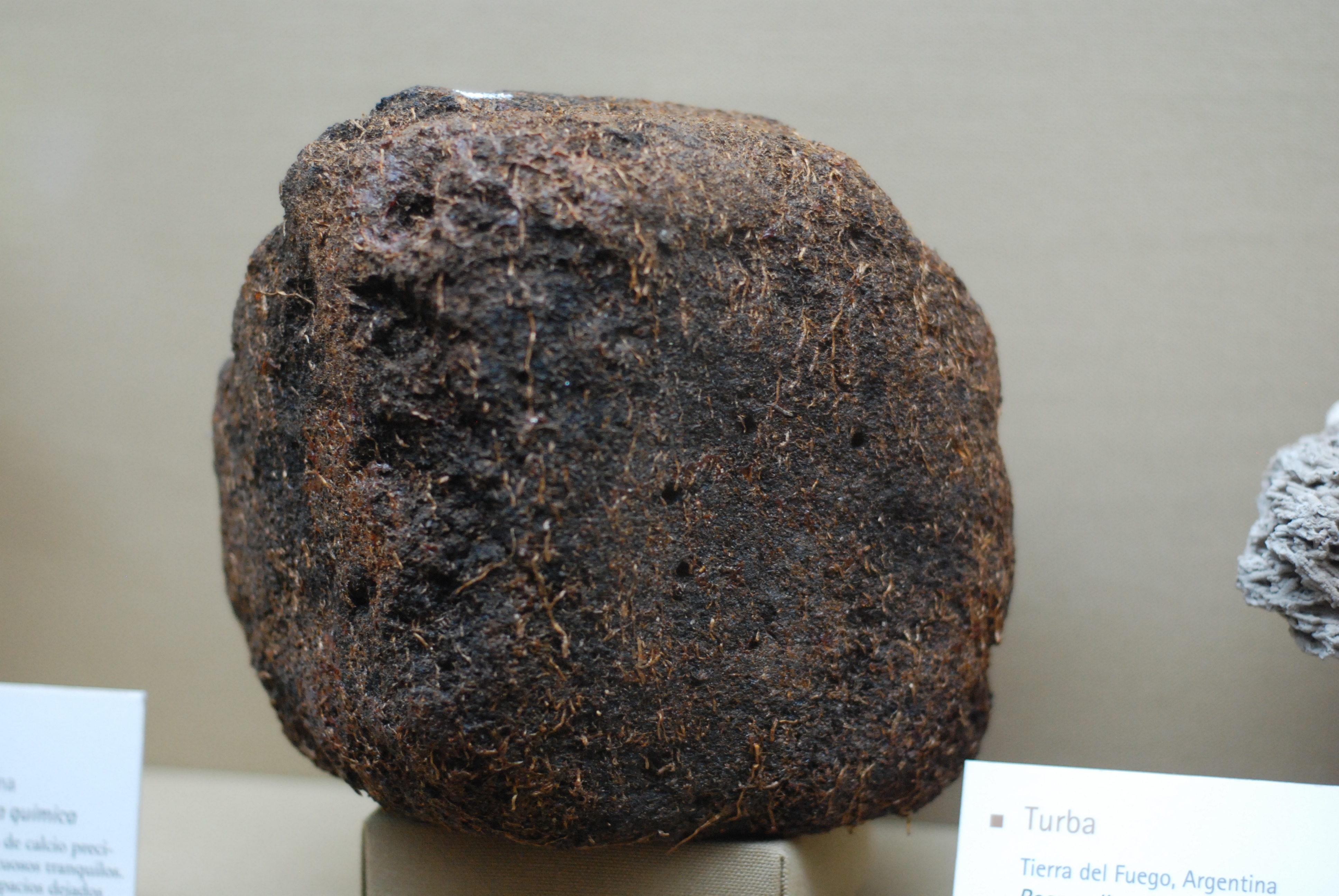 Turba, Roca sedimentaria bíoquímica. Restos vegetales de lagos y lagunas con poco oxígeno; pueden utilizarse como combustible, Tierra del Fuego, Argentina.